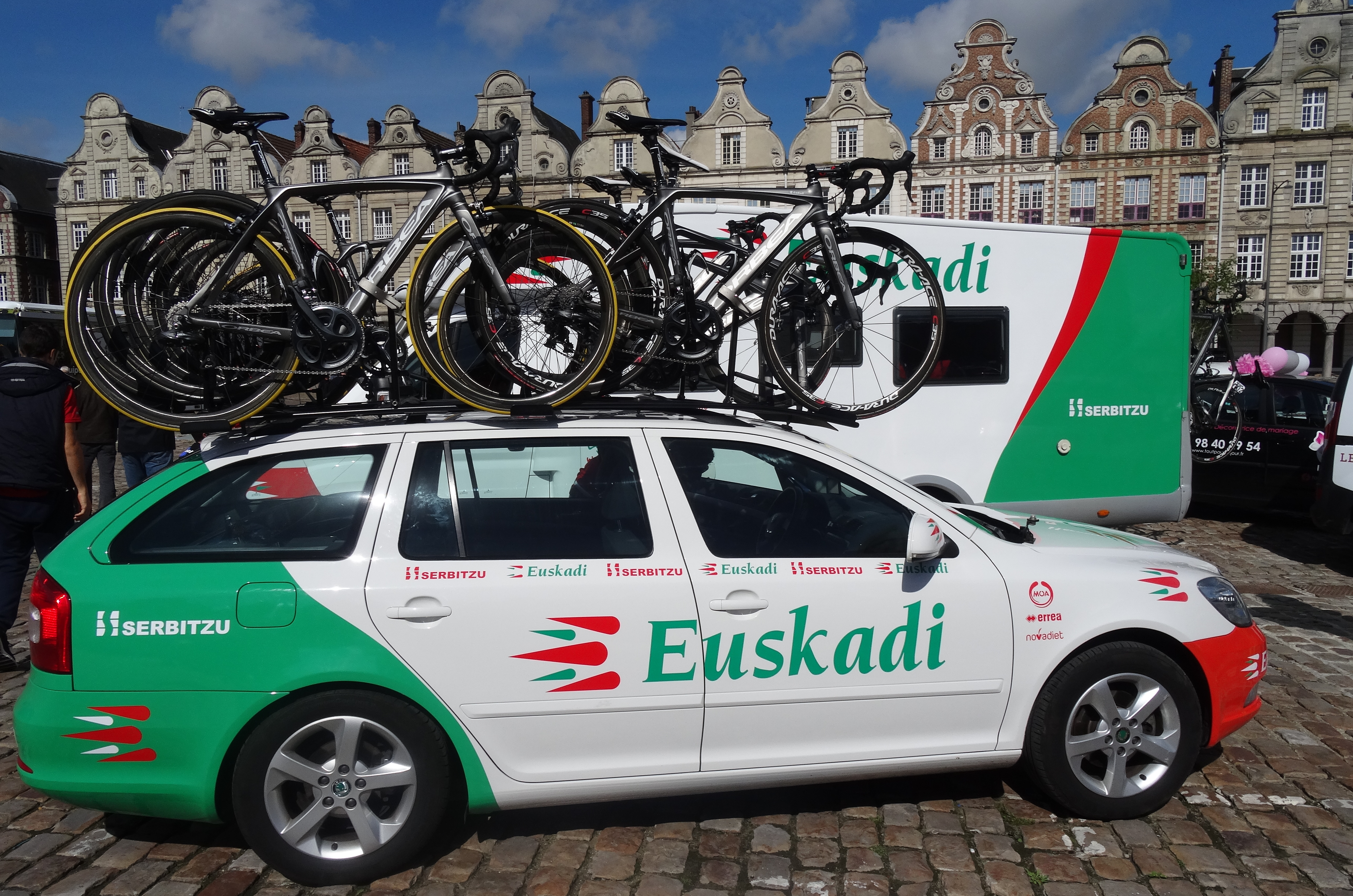 Reportage photographique réalisé le dimanche 25 mai 2014 à l'occasion du départ et de l'arrivée de la troisième étape du Paris-Arras Tour 2014 à Arras, Pas-de-Calais, Nord-Pas-de-Calais, France.